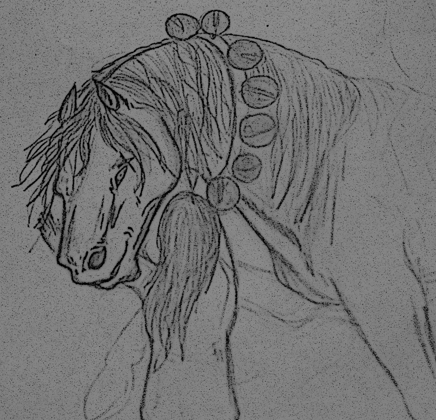 Tête d'ech Goblin tentant un enfant de le monter